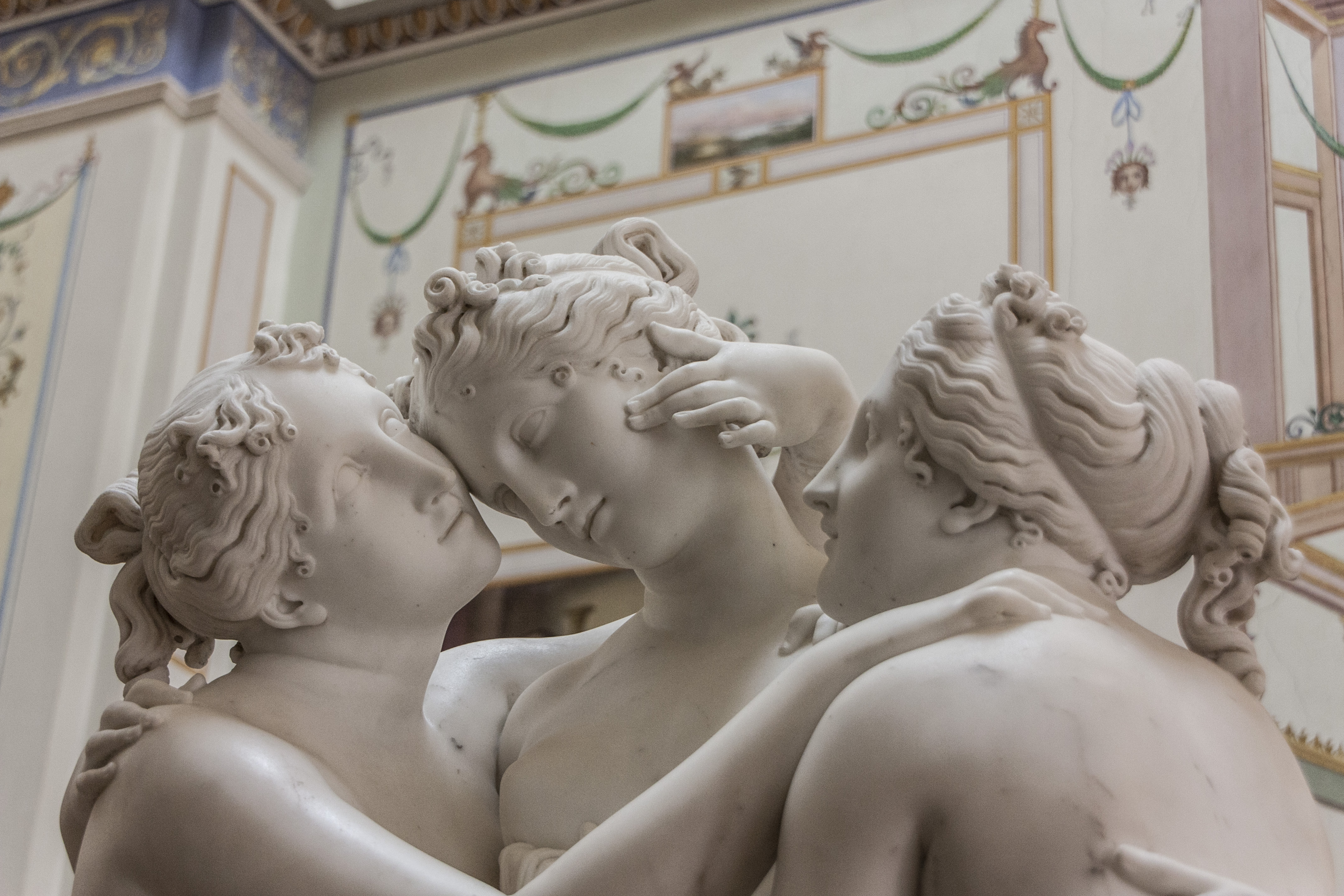 Le tre grazie (dettaglio)